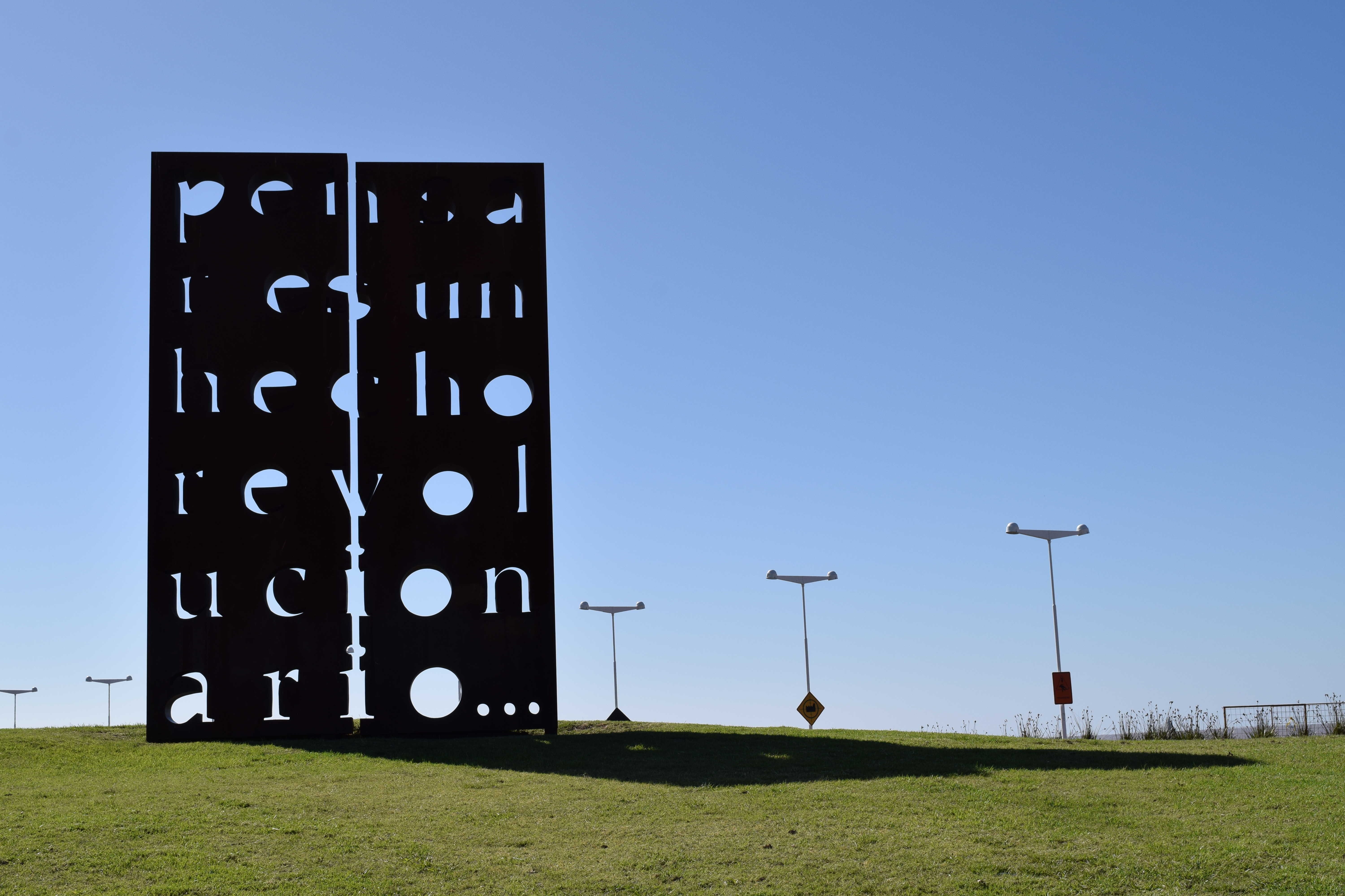 Pensar es un hecho revolucionario. 1999–2010 | Acero corten. Dos bloques de 6 x 2 x 0,80 m c/u. Marie Orensanz.